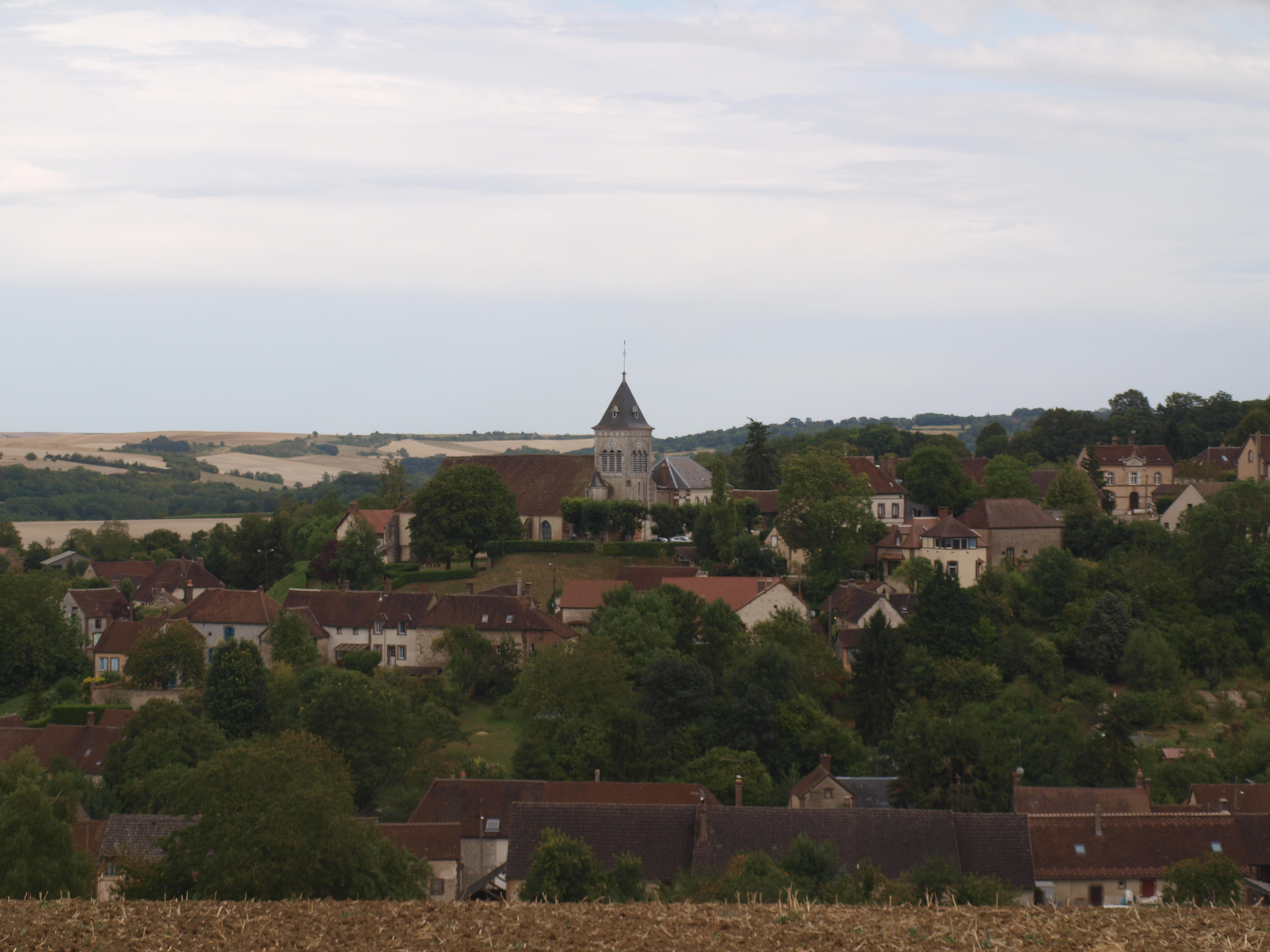 Saint-Aubin-Château-Neuf (Yonne ; France) ; vue nord-ouest depuis la RD 955